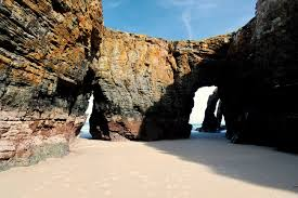 una de las playas mas espectaculares, la playa de las catedrales